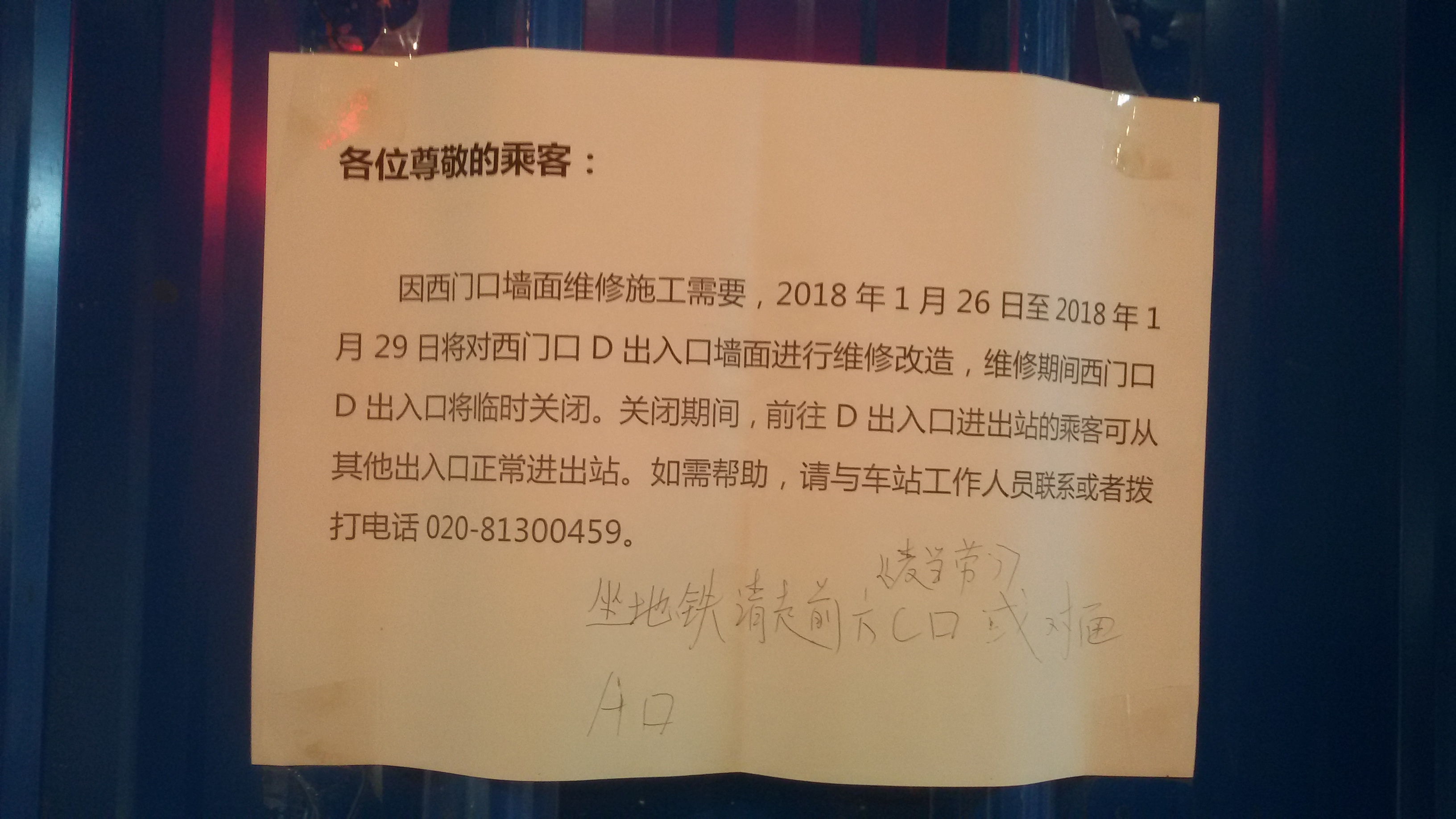 粵語: 廣州地鐵西門口站D出入口試過因為牆面搞裝修而喺2018年1月26～29號閂咗門三日